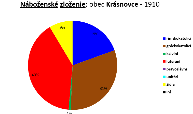 Náboženské zloženie obce Krásnovce, podľa sčítania v roku 1910.